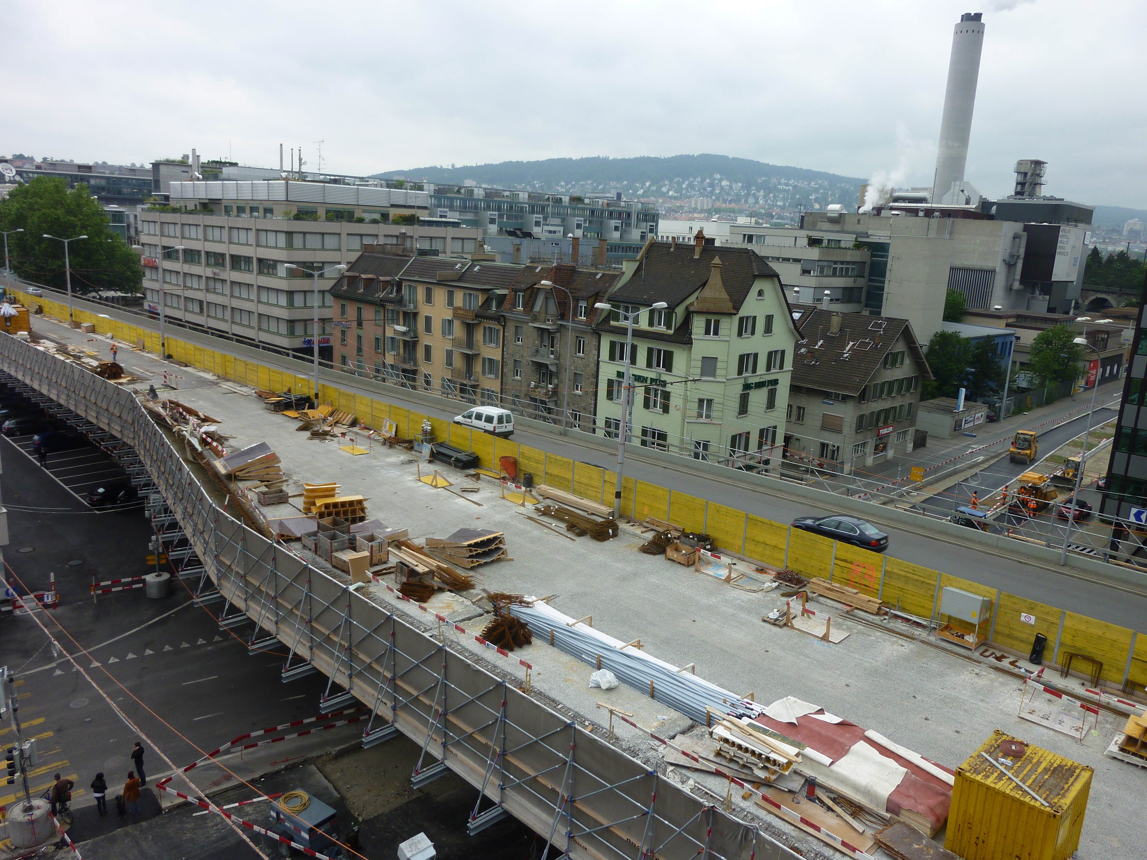 Hardbrücke